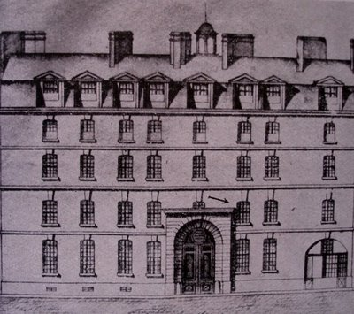 Séminaire Saint-Firmin dit aussi des Bons-Enfants ou de la Mission ou des Lazaristes, rue Saint-Victor, quartier Maubert, actuel Ve arrondissement, Paris, France. - Ancien Collège des Bons-Enfants dépendant de l'Université; Jean-François de Gondy, archevêque de Paris en donne la principalité à (saint) Vincent de Paul pour y diriger un seminaire de jeunes ecclésiastiques pensionnaires; celui-ci confie la direction de ce seminaire aux Prètres de la Mission en 1625. [1]